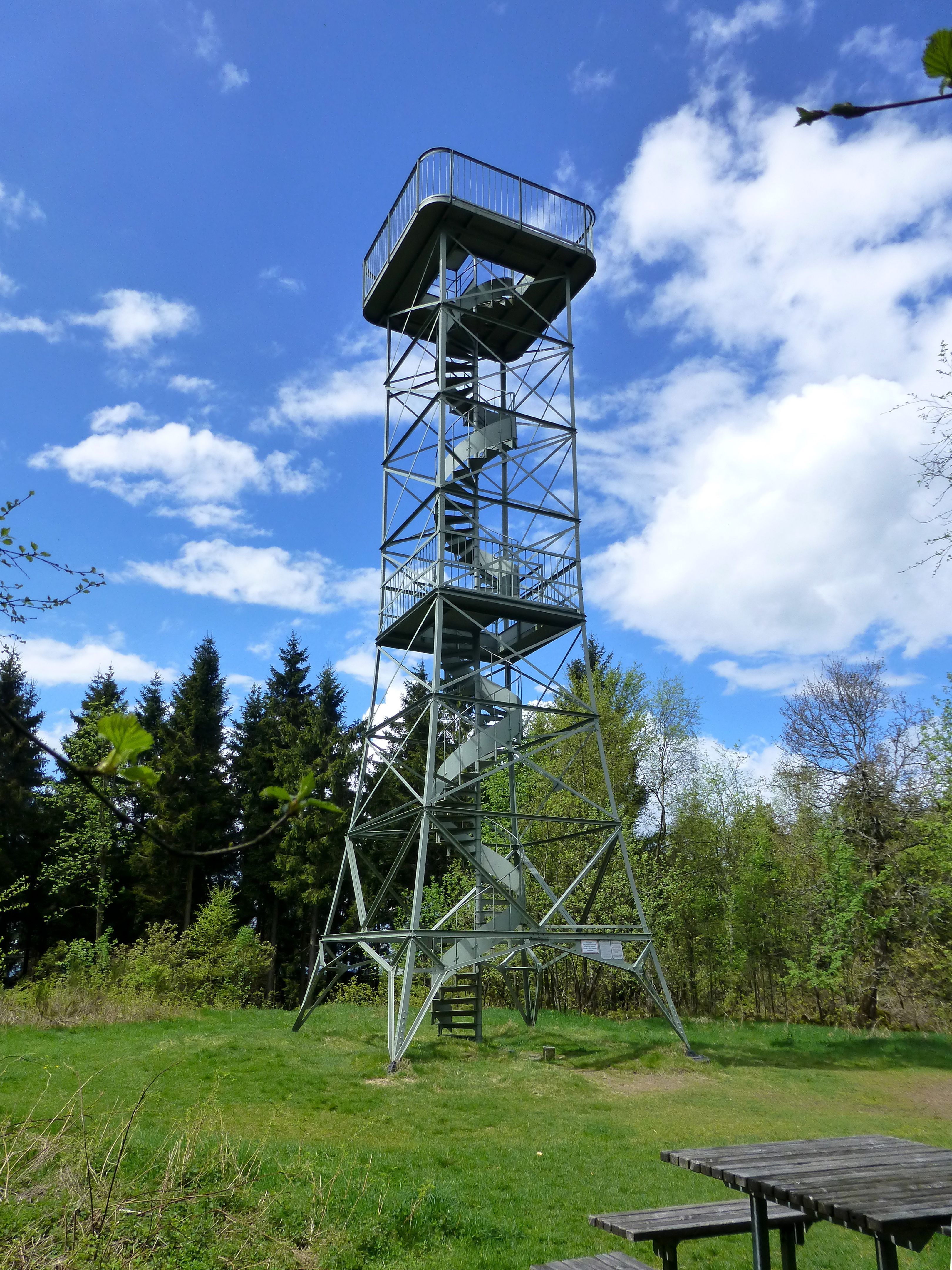 Gillerturm; Ansicht von Osten (2017)